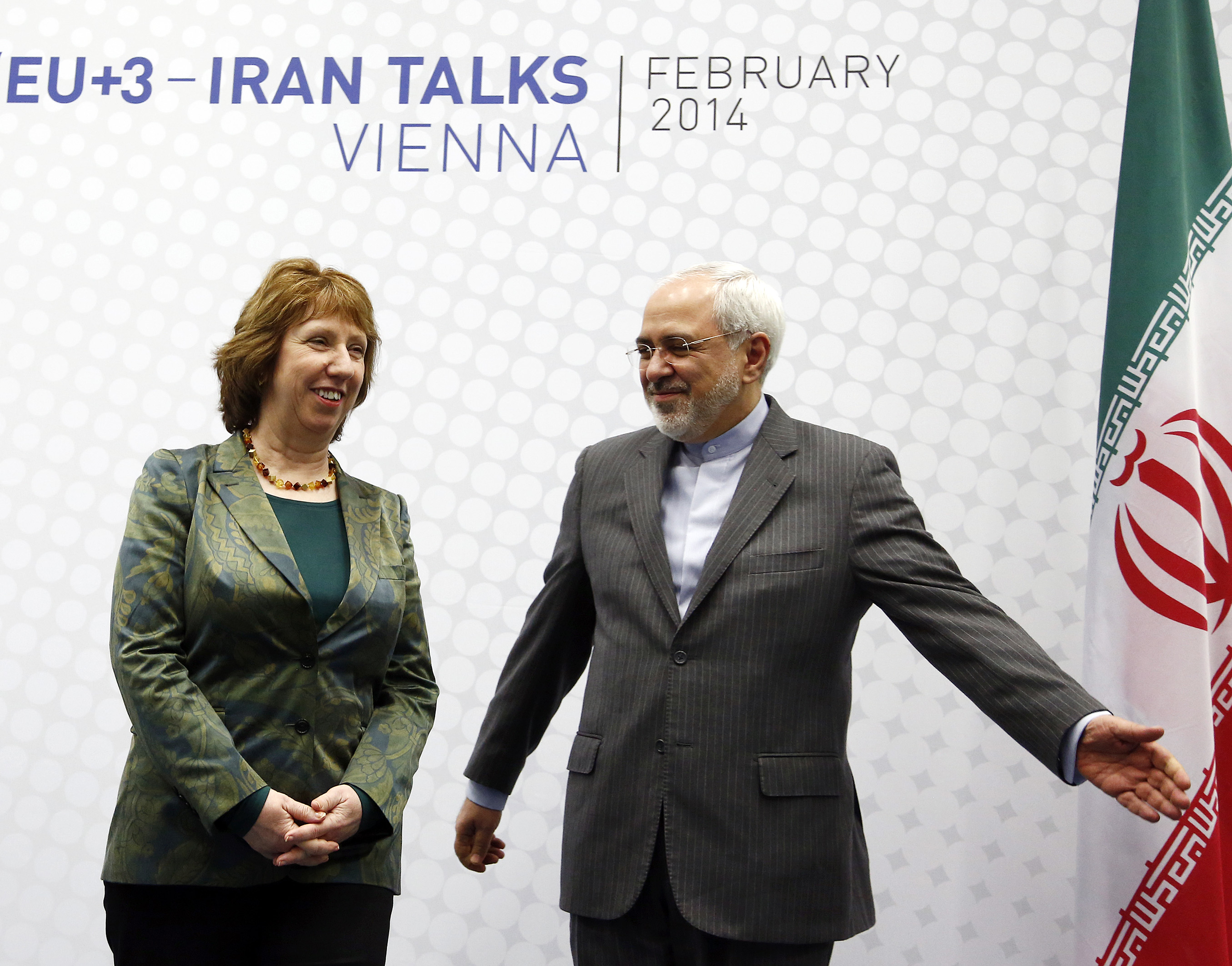 Irankonferenz. Außenminister Mohammed Dschawad Sarif trifft die Hohe Vertreterin der EU für Außen- und Sicherheitspolitik, Catherine Ashton in Wien. 18.02.2014, Foto: Dragan Tatic